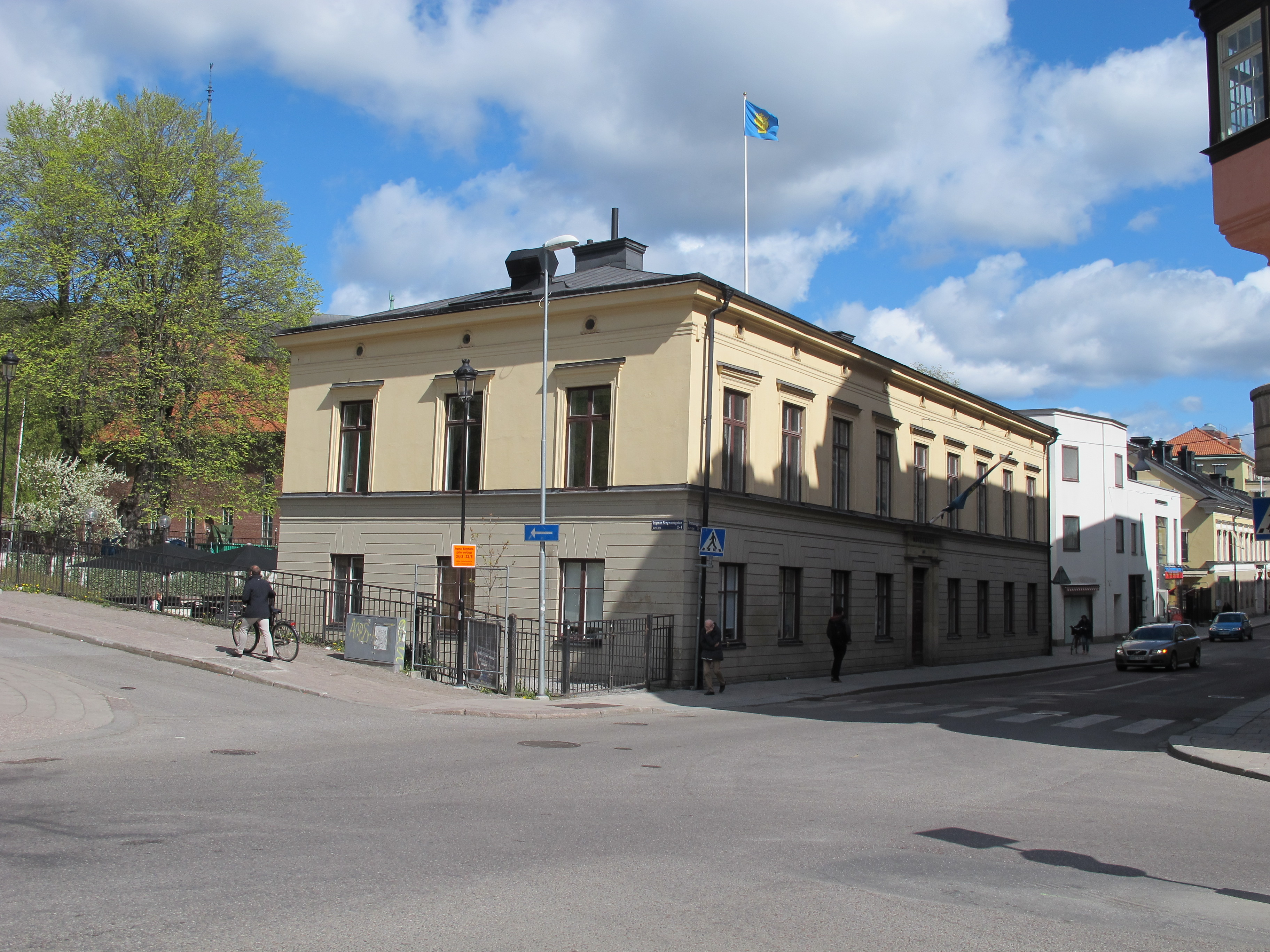 Stockholms Nation i Uppsala, sett från Drottninggatan.